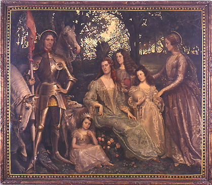 Au temps des aieux, tableau de Emile Motte. Photo Lefrancq. Mons